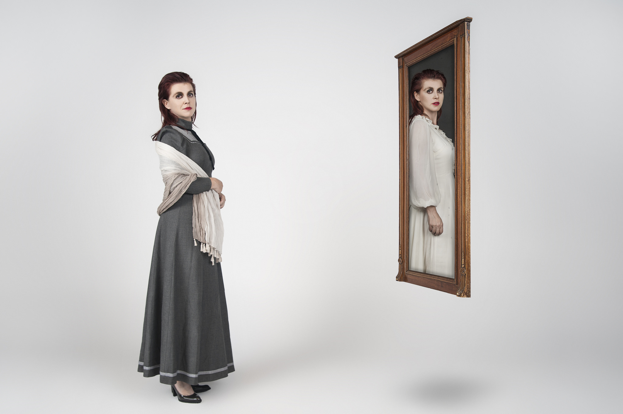 Agnieszka Makówka. Projekt "Metropolis" w obsadzie: Agnieszka Makówka, Igor Gwadera, Władysław Komendarek